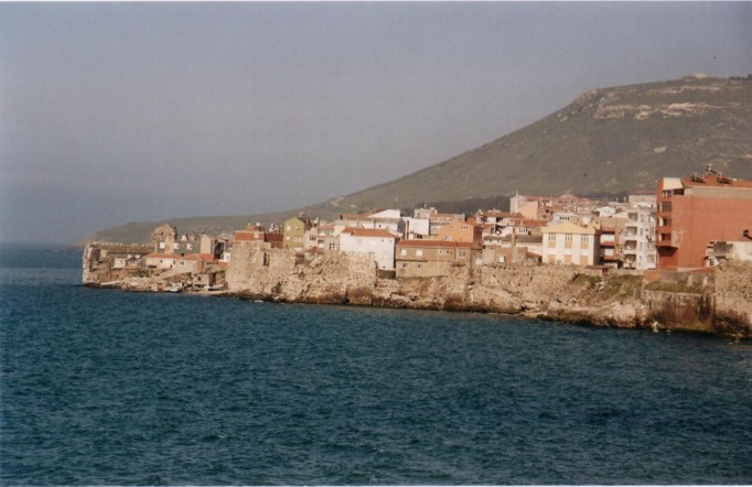 Sinop, Turkey